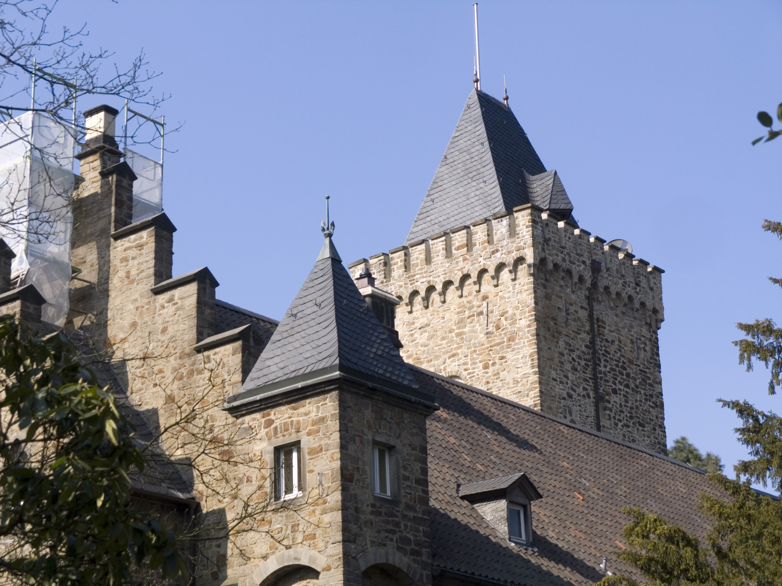 Северный Рейн - Вестфалия, Эссен - Кеттвиг, замок Ёфте